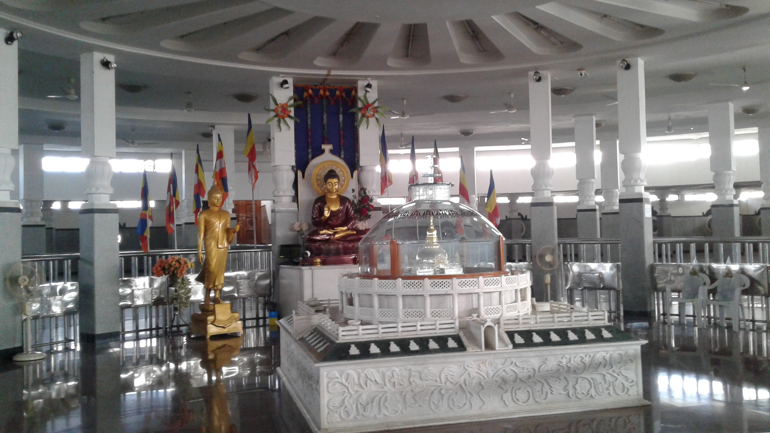 दीक्षाभूमीतील आतील बाजू - बुद्ध मुर्तींसमोरील काचेमध्येकाचेमध्ये बोधीसत्व डॉ. बाबासाहेब आंबेडकर यांचा अस्थी कलश